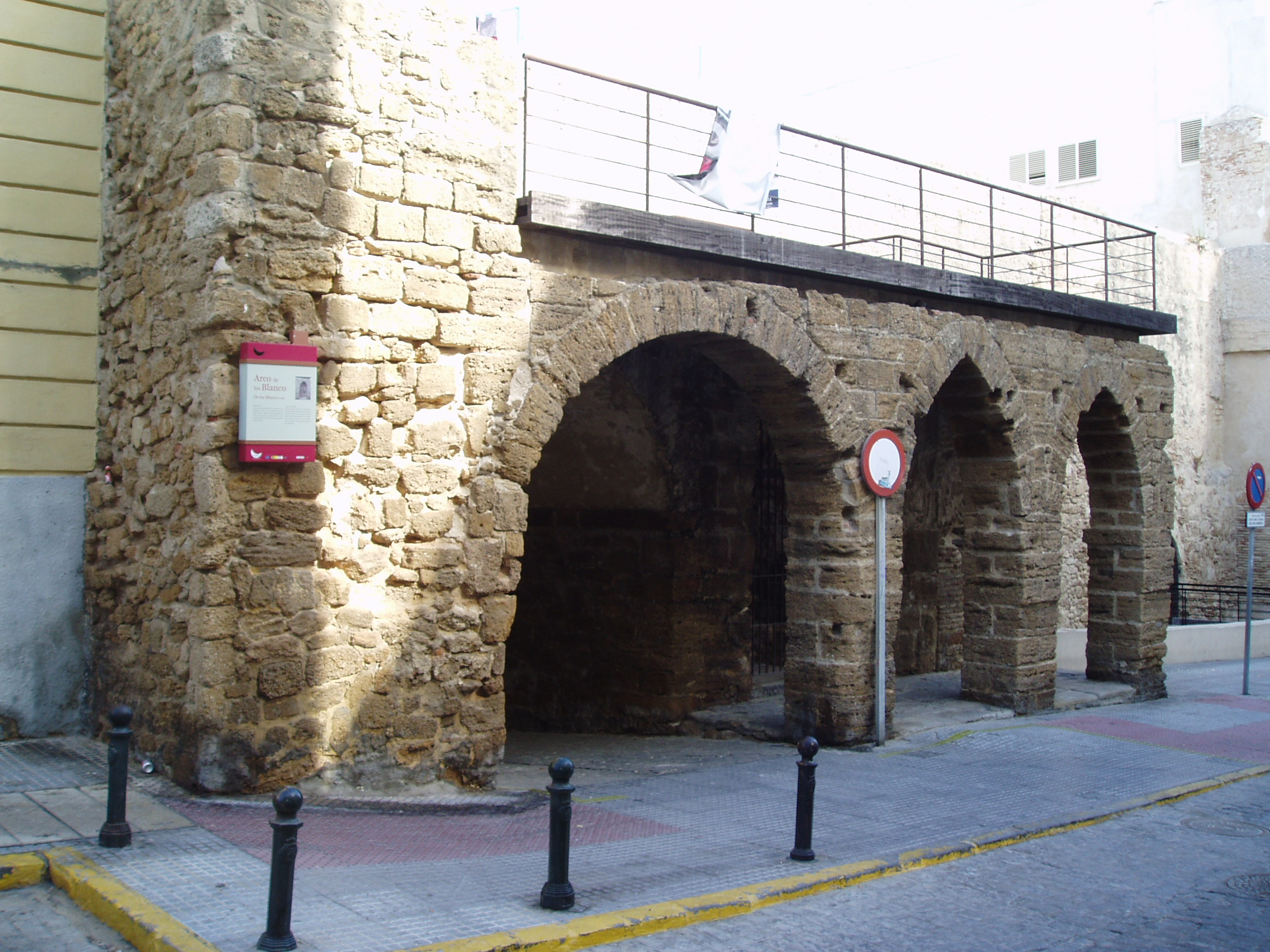 Arco de los Blanco, una de las puertas del Cádiz medieval, situado en el barrio del Pópulo (Cádiz, España). Se trata de la puerta oriental de la muralla de la ciudad, fue construida en el siglo XIII por Alfonso X el Sabio. Dicha muralla era de mampostería y cal, almenada y con torres; formada por tres lienzos que daban al oeste, al norte y al este, la parte sur quedaba sin cubrir por no ser necesaria, debido a los difícil de su acceso. Esta puerta, en forma de arco apuntado y bóveda de cañón, daba a la zona del itsmo, por lo que se denominó también Puerta de Tierra, posteriormente fue llamada de Santa María, ya que daba al arrabal de dicho nombre. En el siglo XVII debió ser restaurada, en 1621 una familia de comerciantes, los Blanco, pidió permiso para establecer en ella una capilla dedicada a la Virgen de los Remedios, finalizada en 1635 y hoy perdida; sólo se conserva la parte interior del arco.